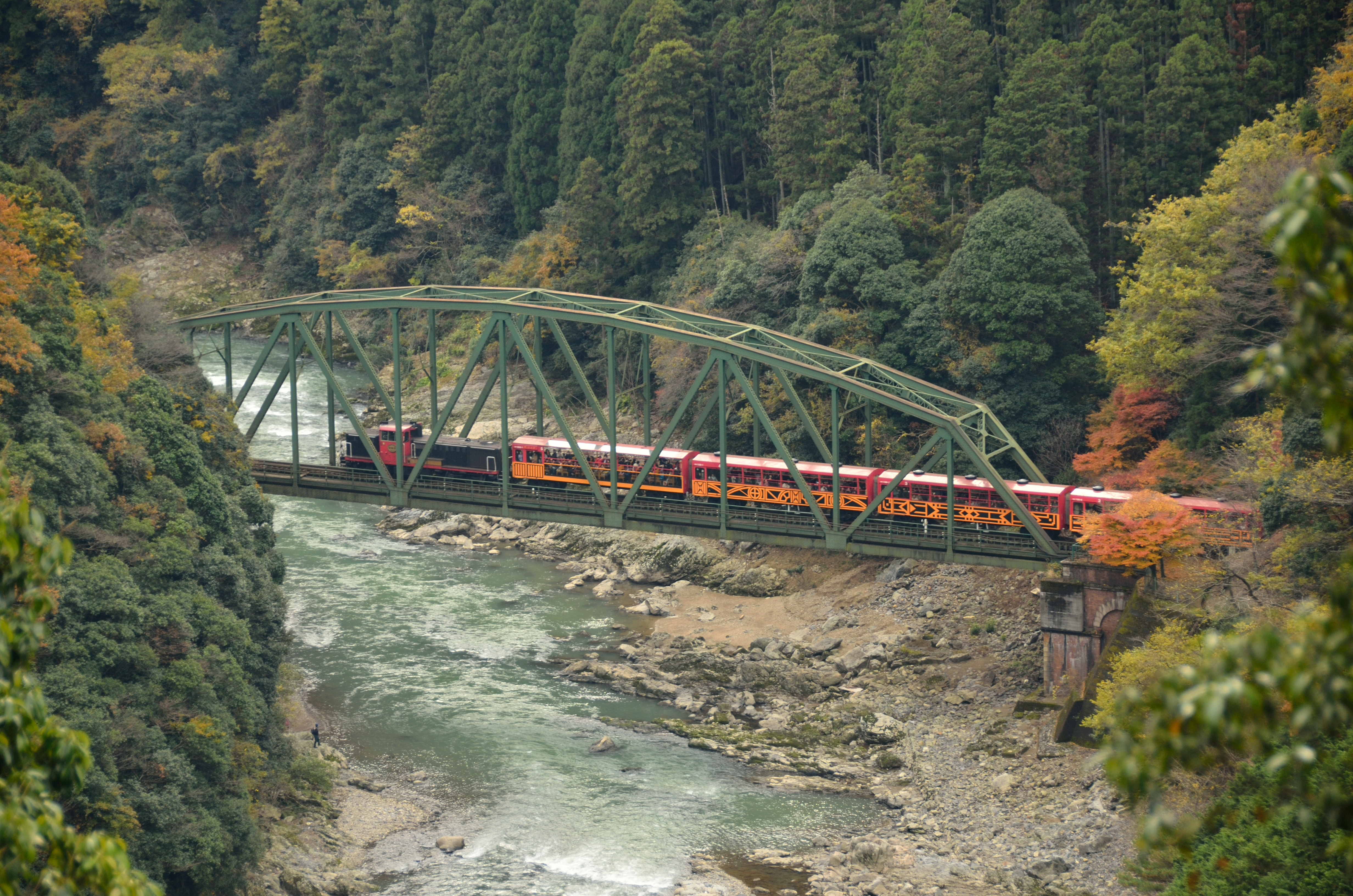 short trip: Arashiyama and Kiyotaki, Kyoto, Japan. 2012-11-24